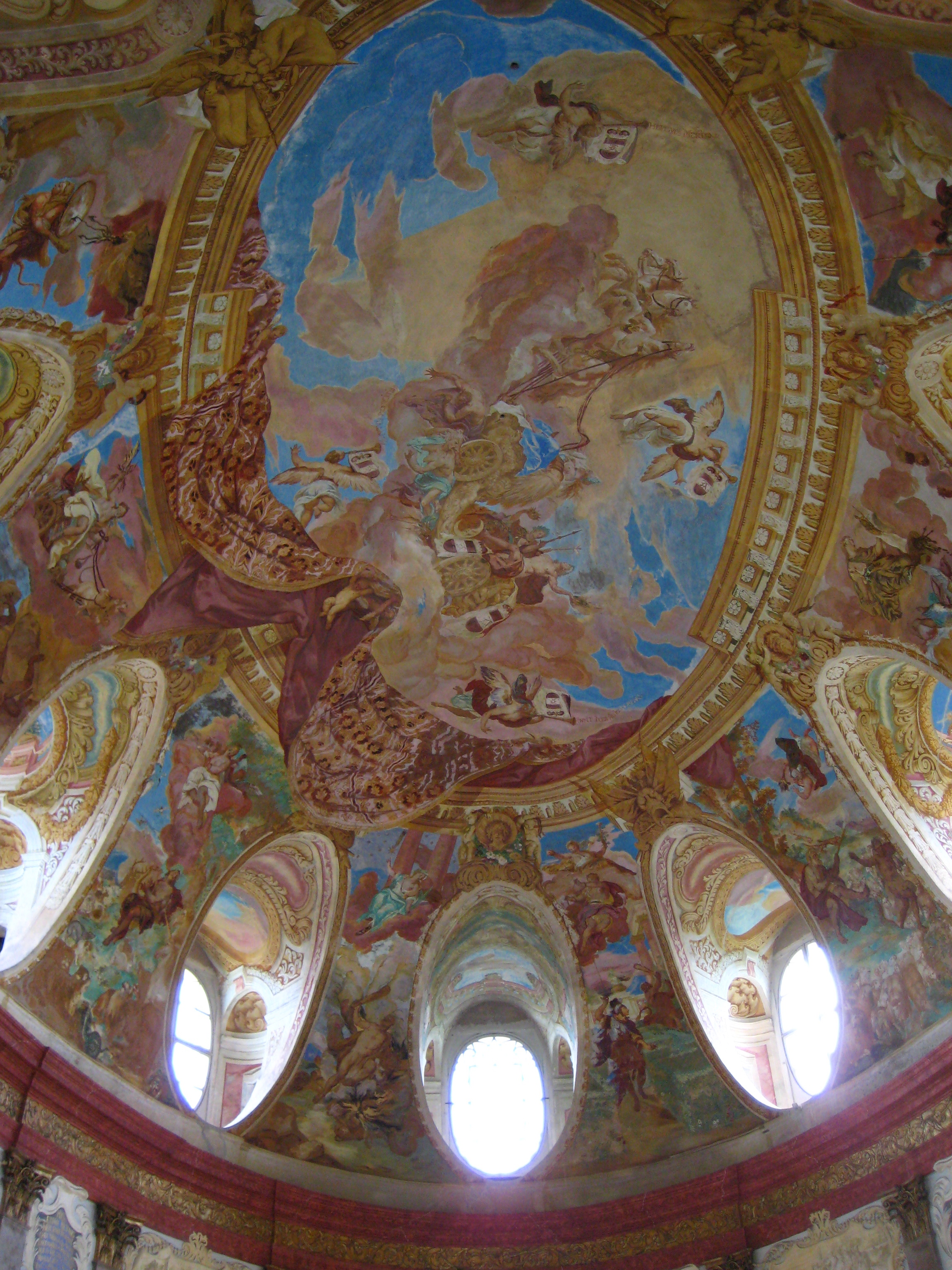 Hrad a zámek, s omezením: bez domku kočího u zámecké jízdárny Vranov nad Dyjí, Vranov nad Dyjí